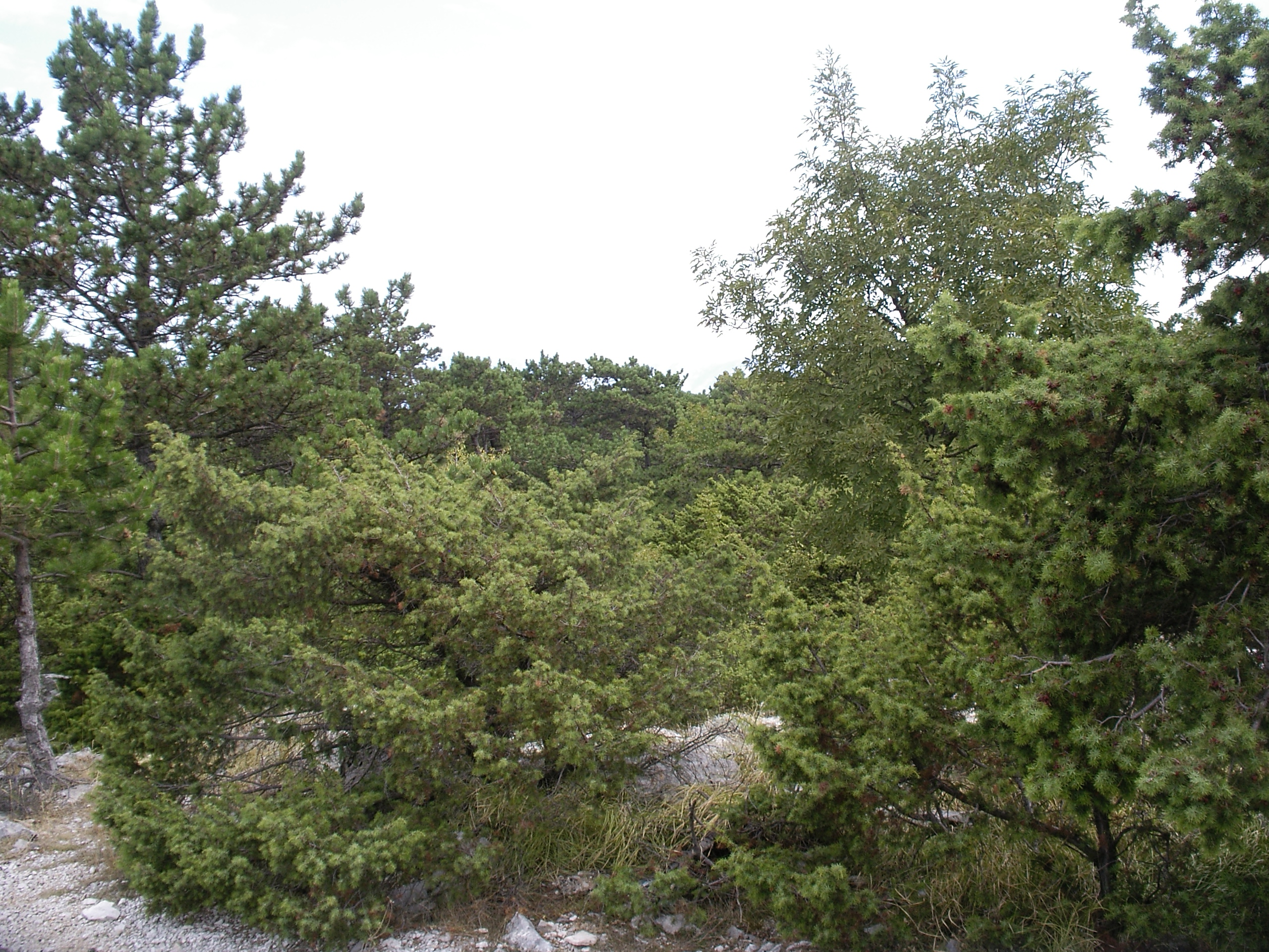 Höhenvegation rund um den Vidova Gora